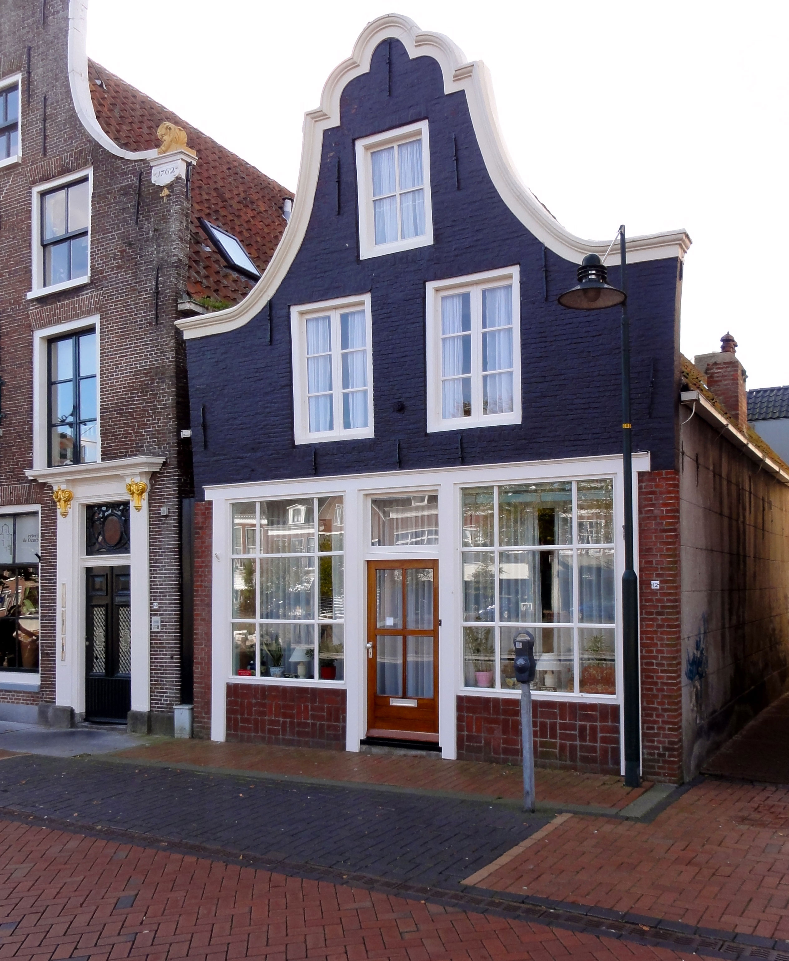 De Dijk 12 Dokkum. rijksmonument